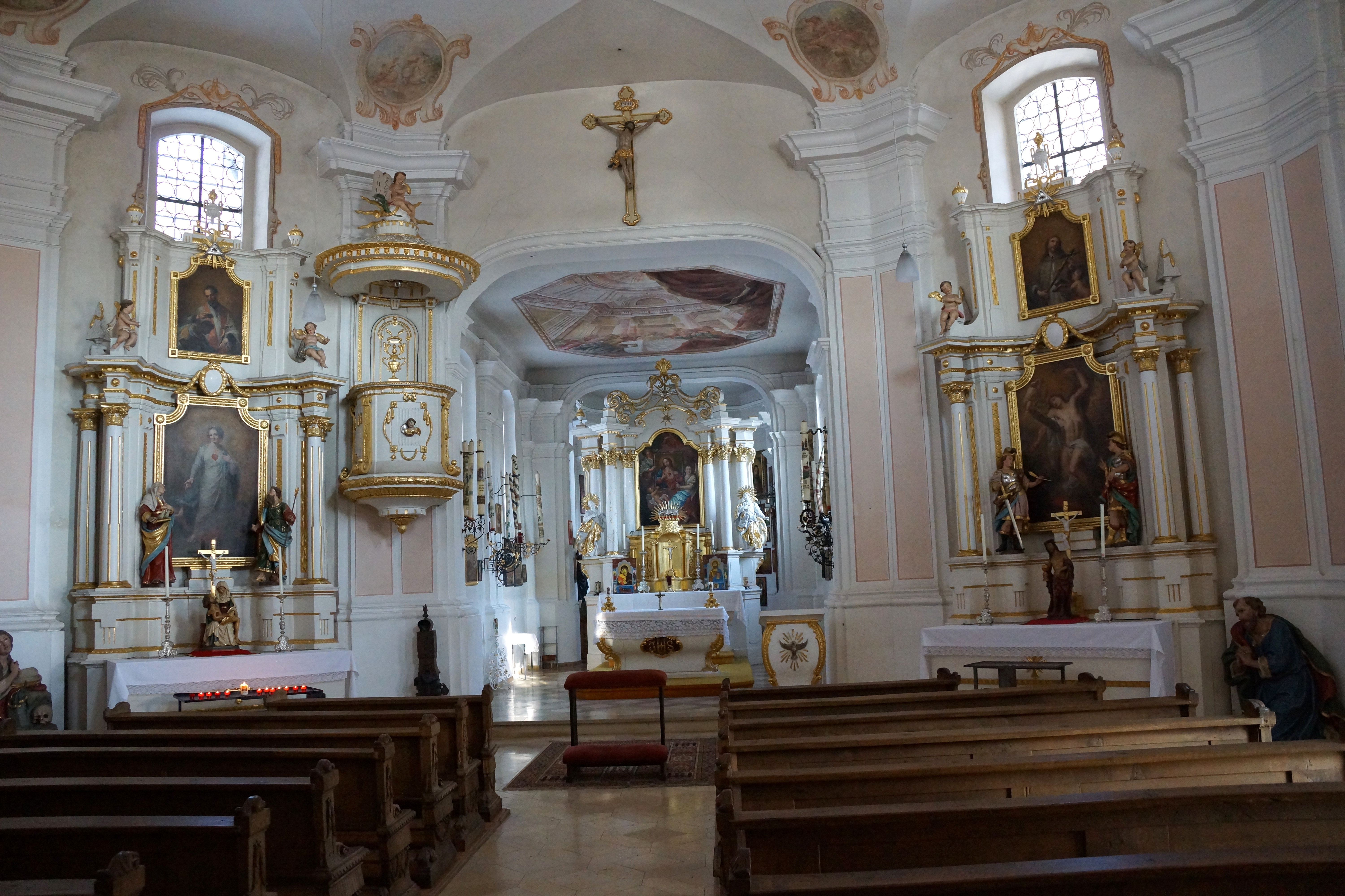 Herz-Jesu-Berg bei Velburg